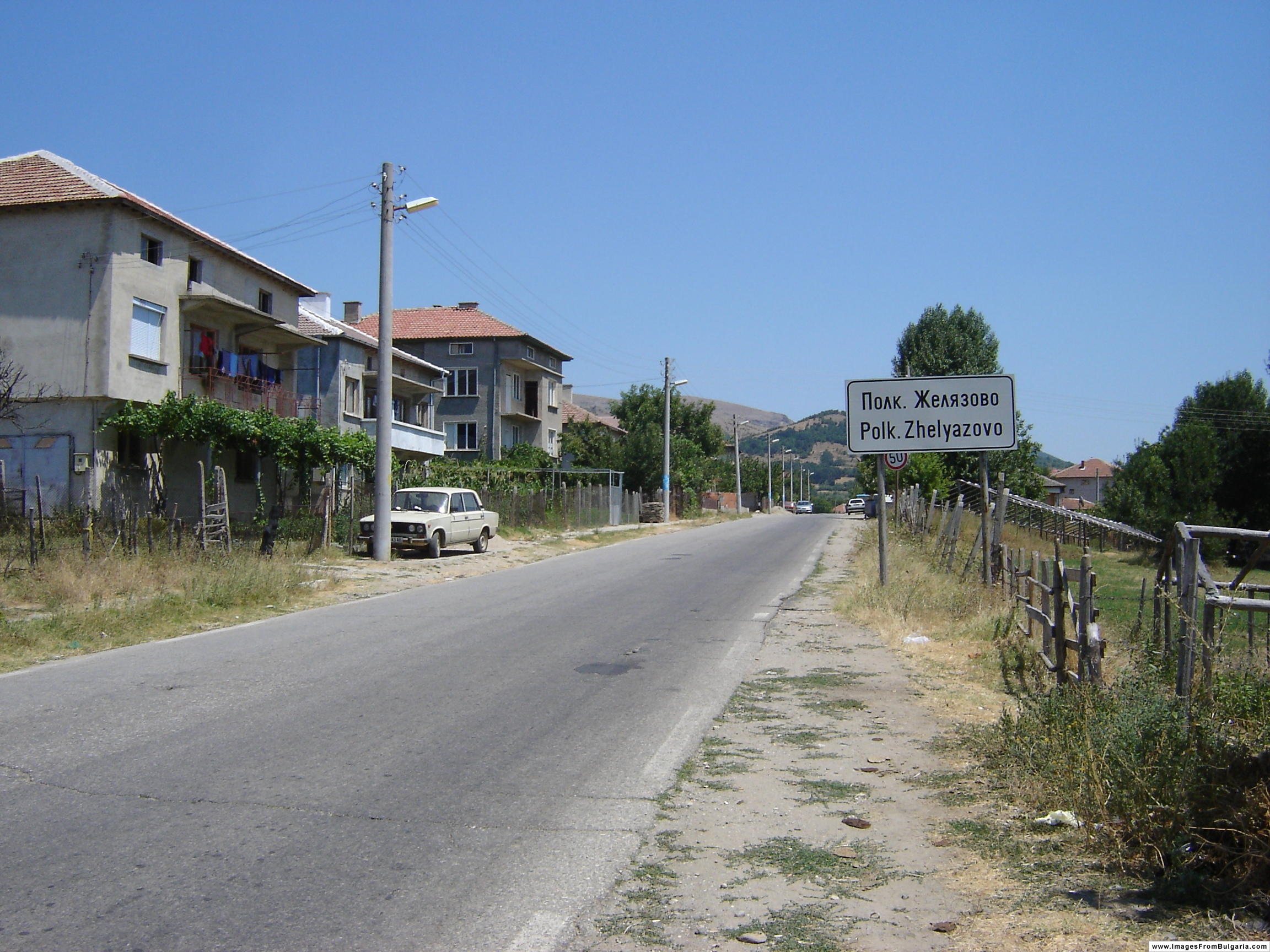 Polkovnik Zhelyazovo main road